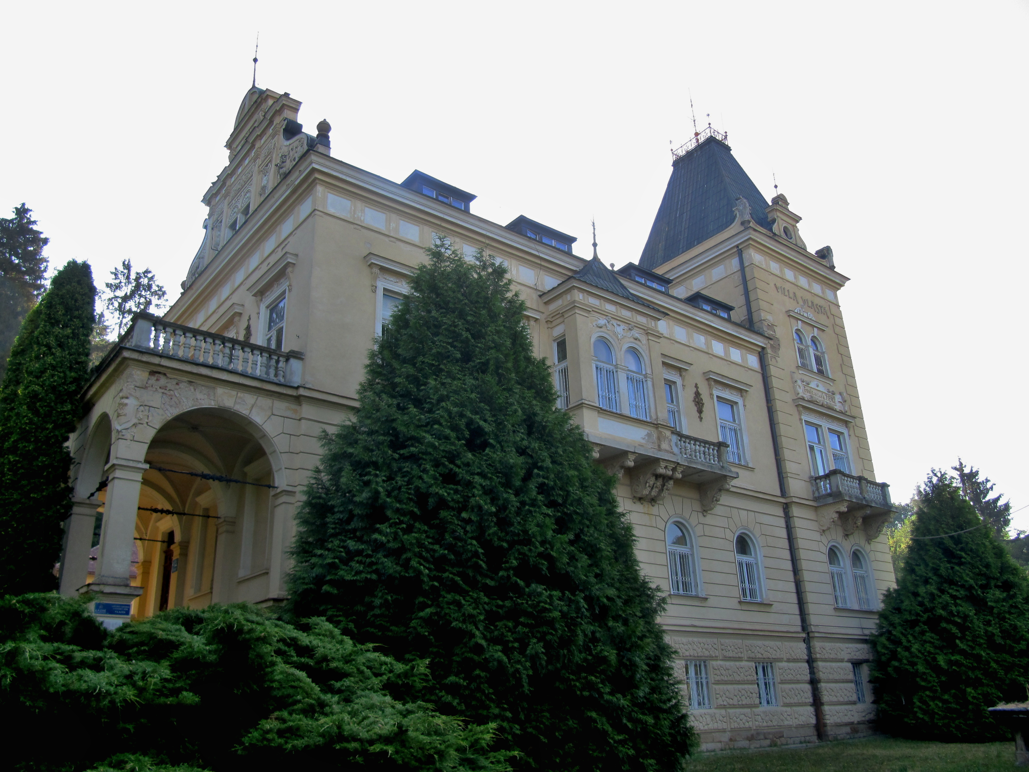 Vila Vlasta (Luhačovice), Bílá Čtvrť 240, Luhačovice